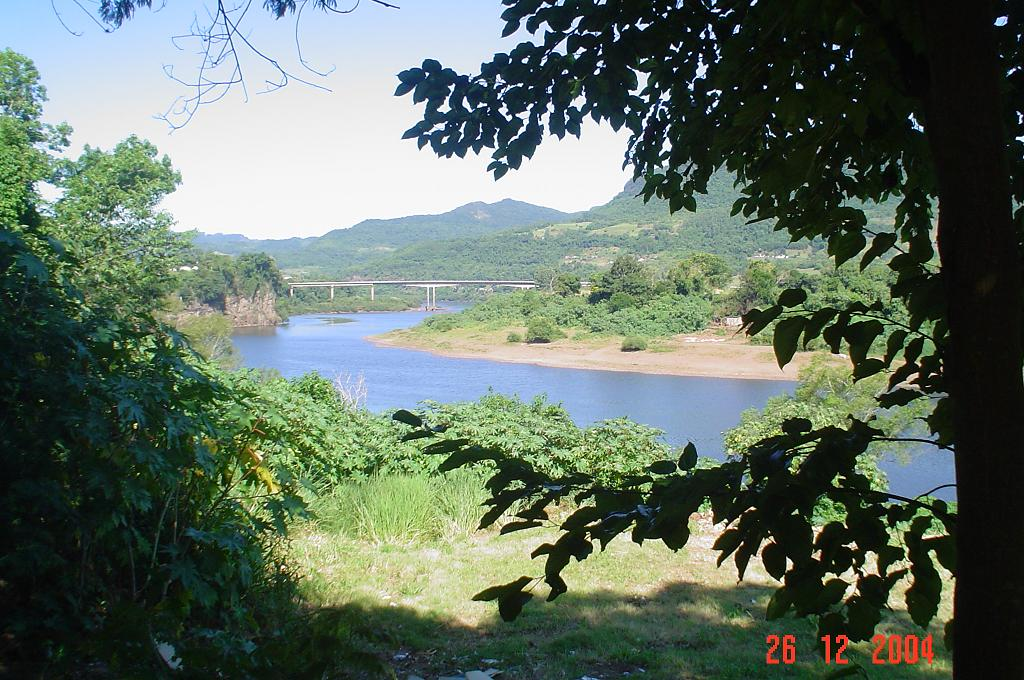 Ponte sobre o Rio Taquari em Roca Sales vista de uma praça central.